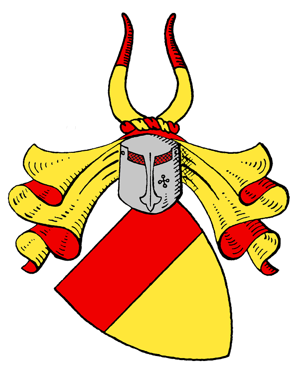 Stammwappen derer von Münster, aber auch der Grafen von Schwerin (der mittelalterlichen Dynastie) „Das Stammwappen derer von Münster ist von Rot und Gold geteilt. Auf dem Helm zwei wie der Schild geteilte Büffelhörner. Die Helmdecken sind rot-golden.“